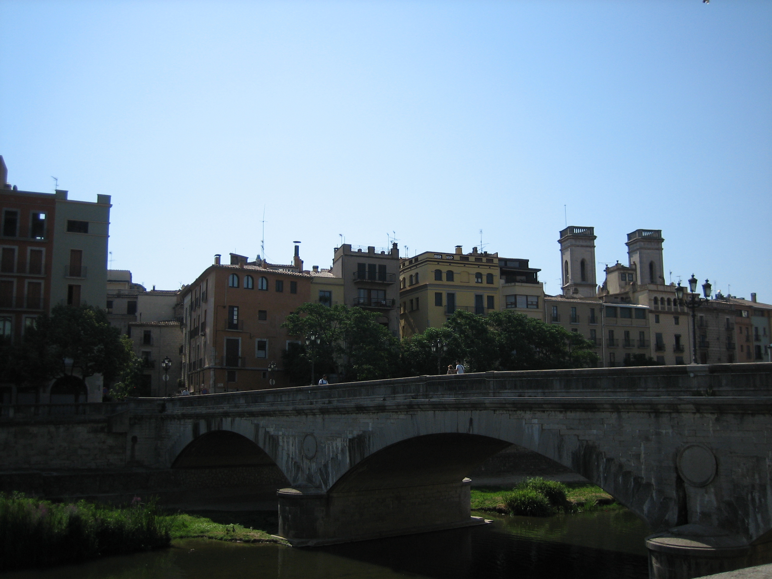 Girona: Pont d'Isabel II o Pont de Pedra. Arquitecte: Constantino Germán